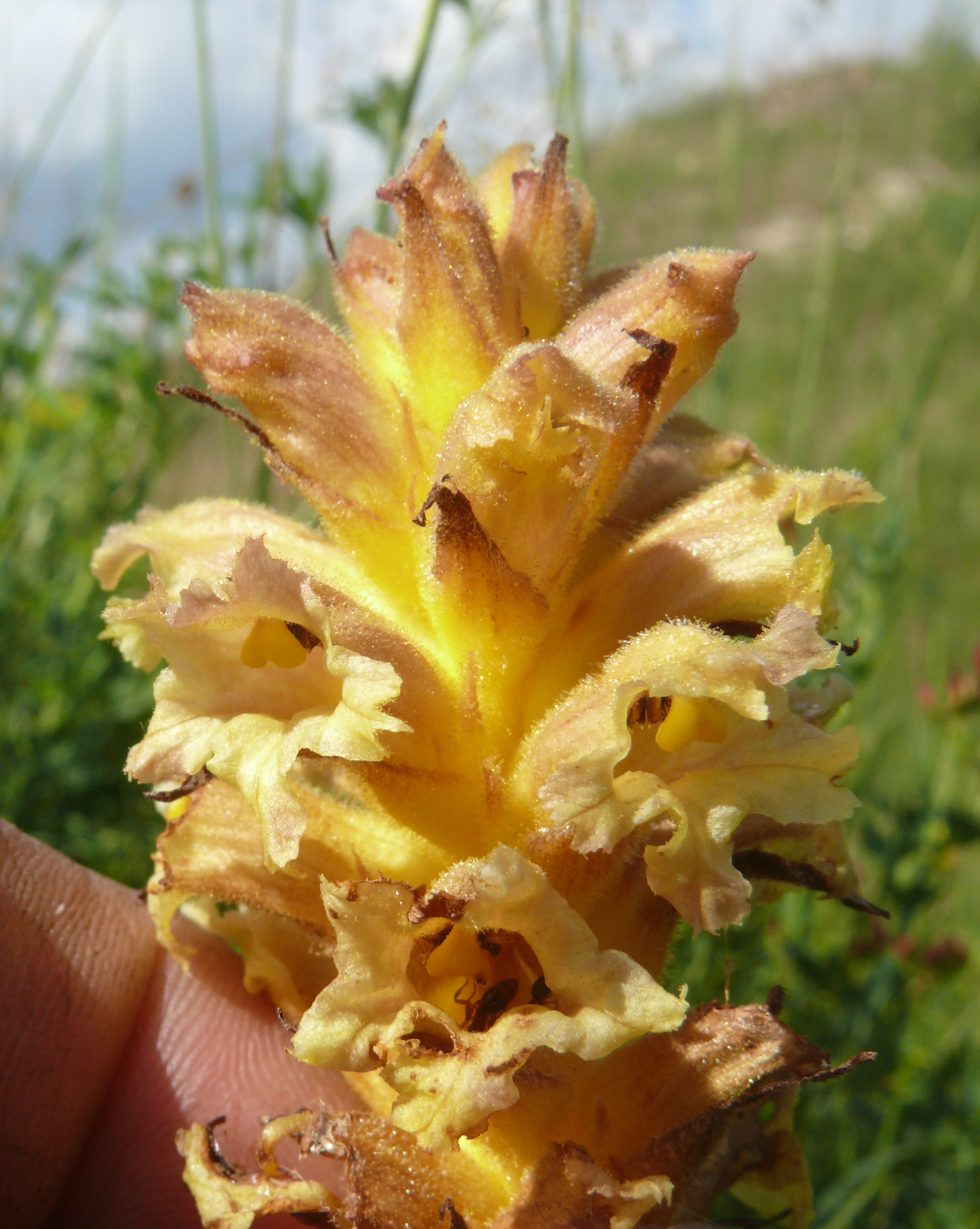 Orobanche lutea, Nördlinger Ries, Deutschland